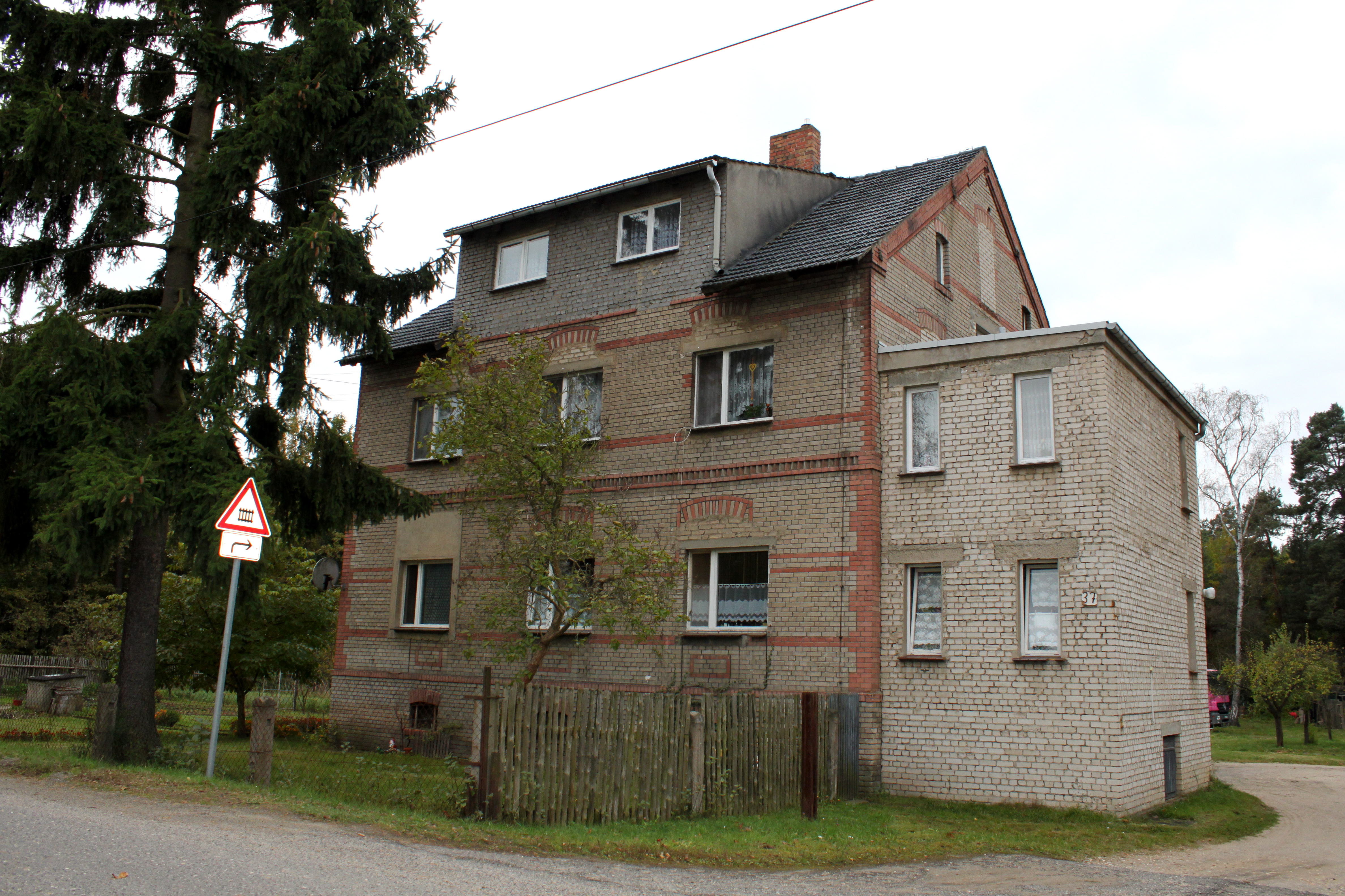 Am Kieswerk, alte Kantine